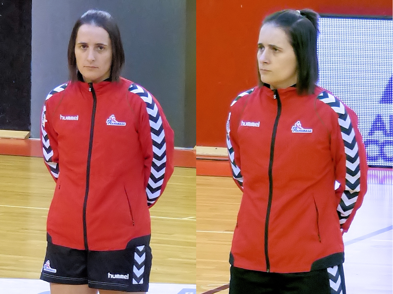 Soeurs Jumelle Bonaventura, arbitres de hand